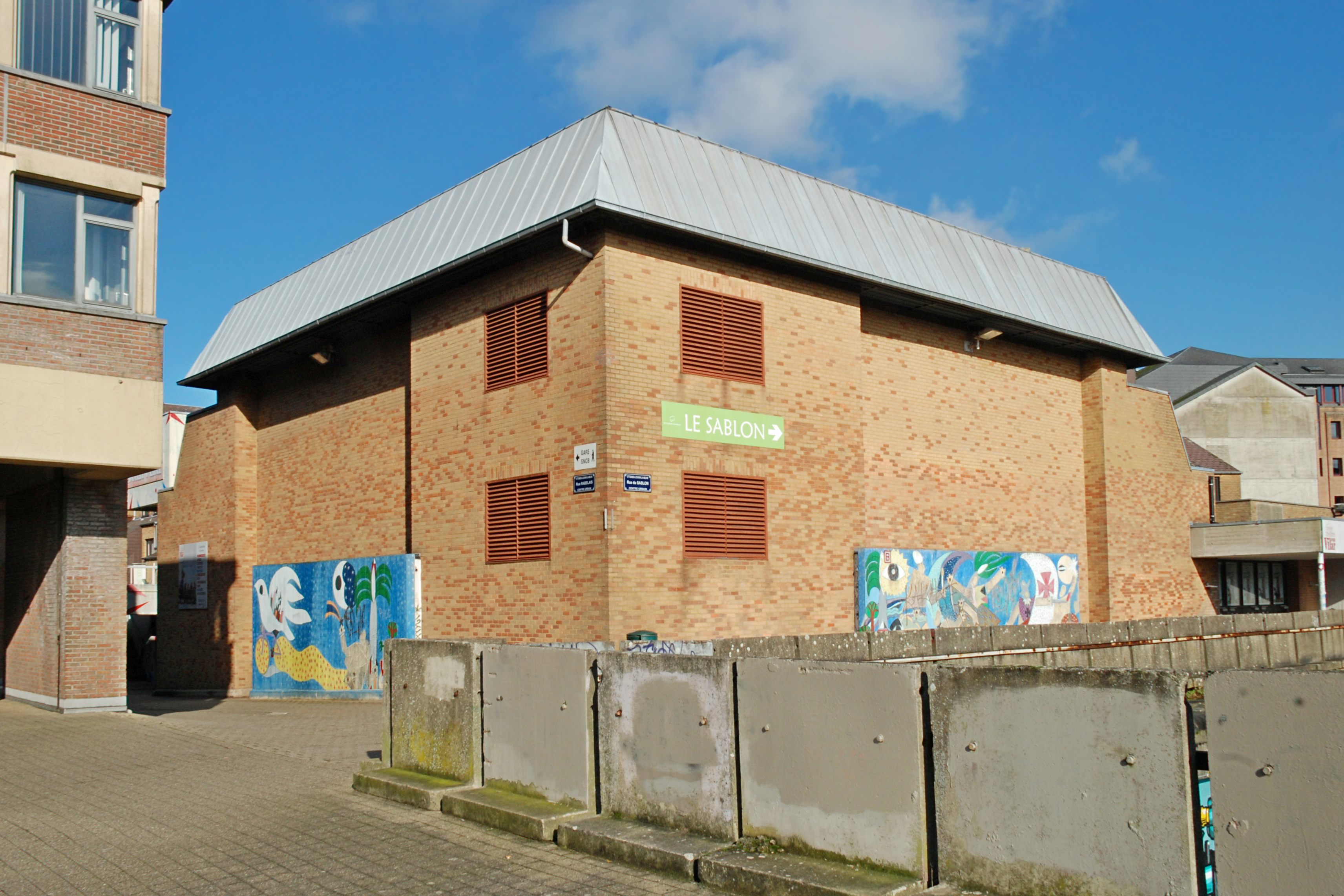 Belgique - Louvain-la-Neuve - Atelier-Théâtre Jean Vilar